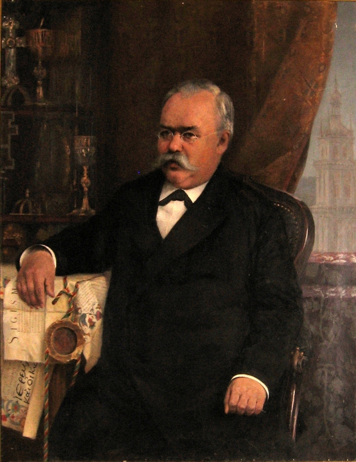 Портрет Исидора Шараневича